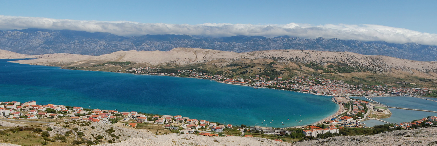 Panorama su Pago città